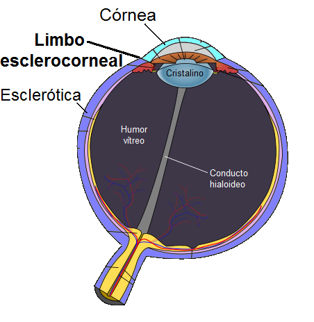 limbus